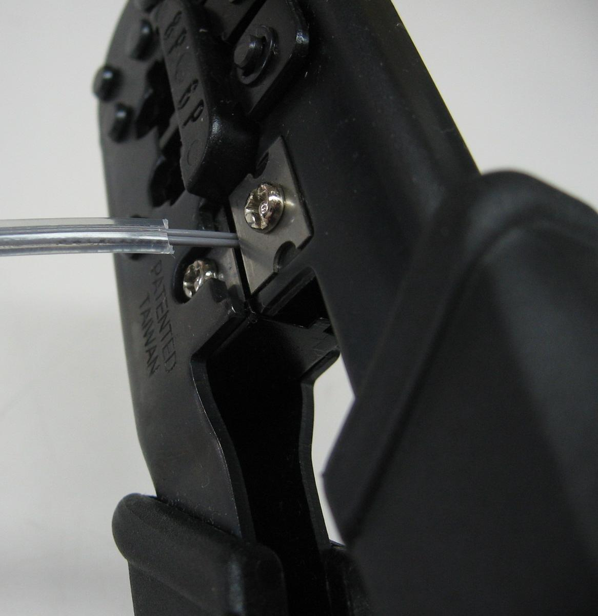 吴语: Wire stripping